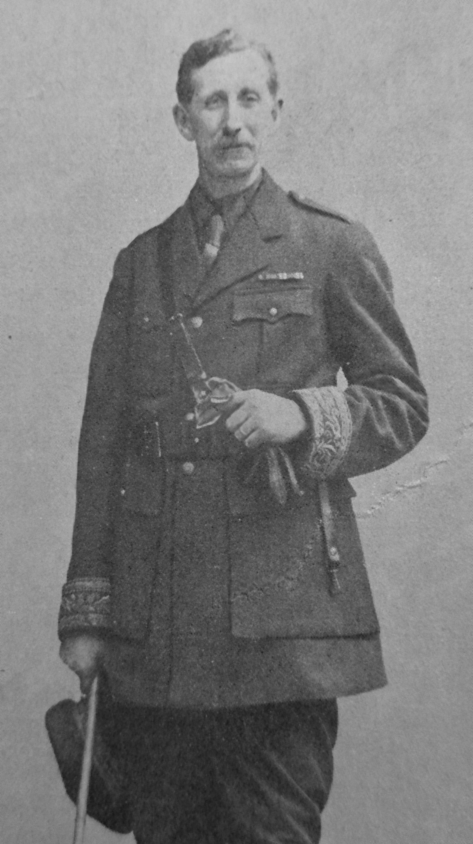 François Georges-Picot, in L'Illustration, n° 3908, p. 82, 26 janvier 1918.